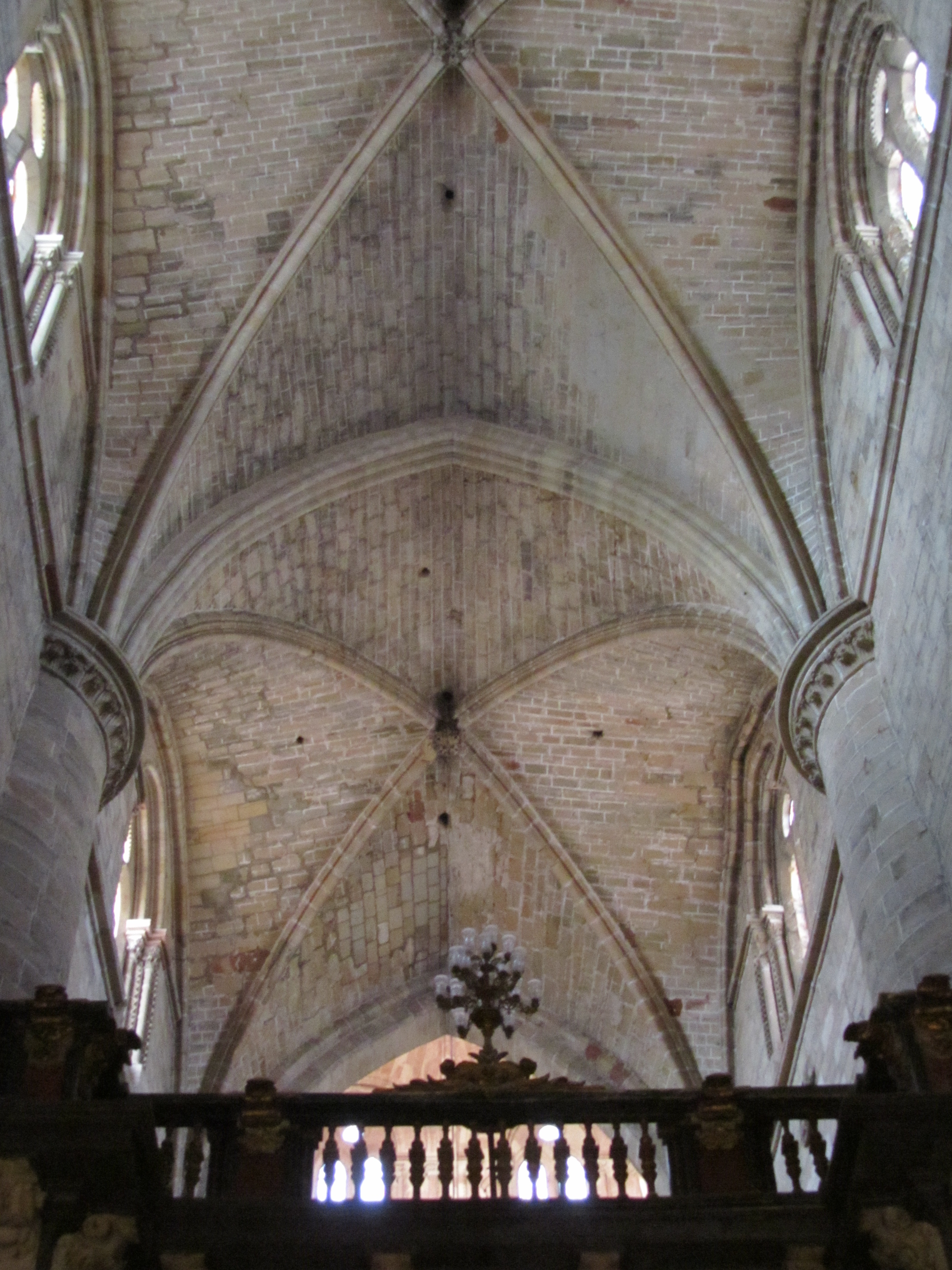 Bóvedas de la nave central de la catedral de Sigüenza (Spain)